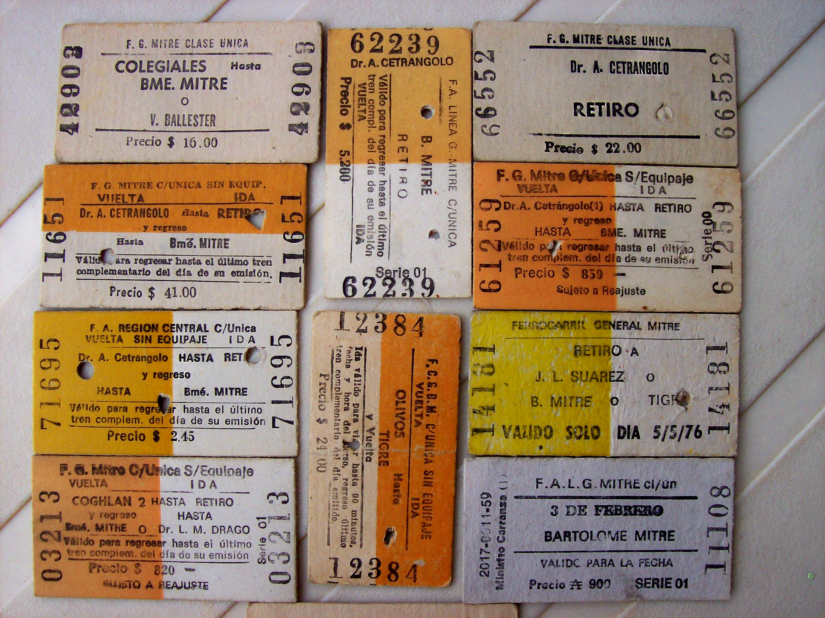 Boletos del tipo Edmondson del Ferrocarril Bartolomé Mitre, Argentina